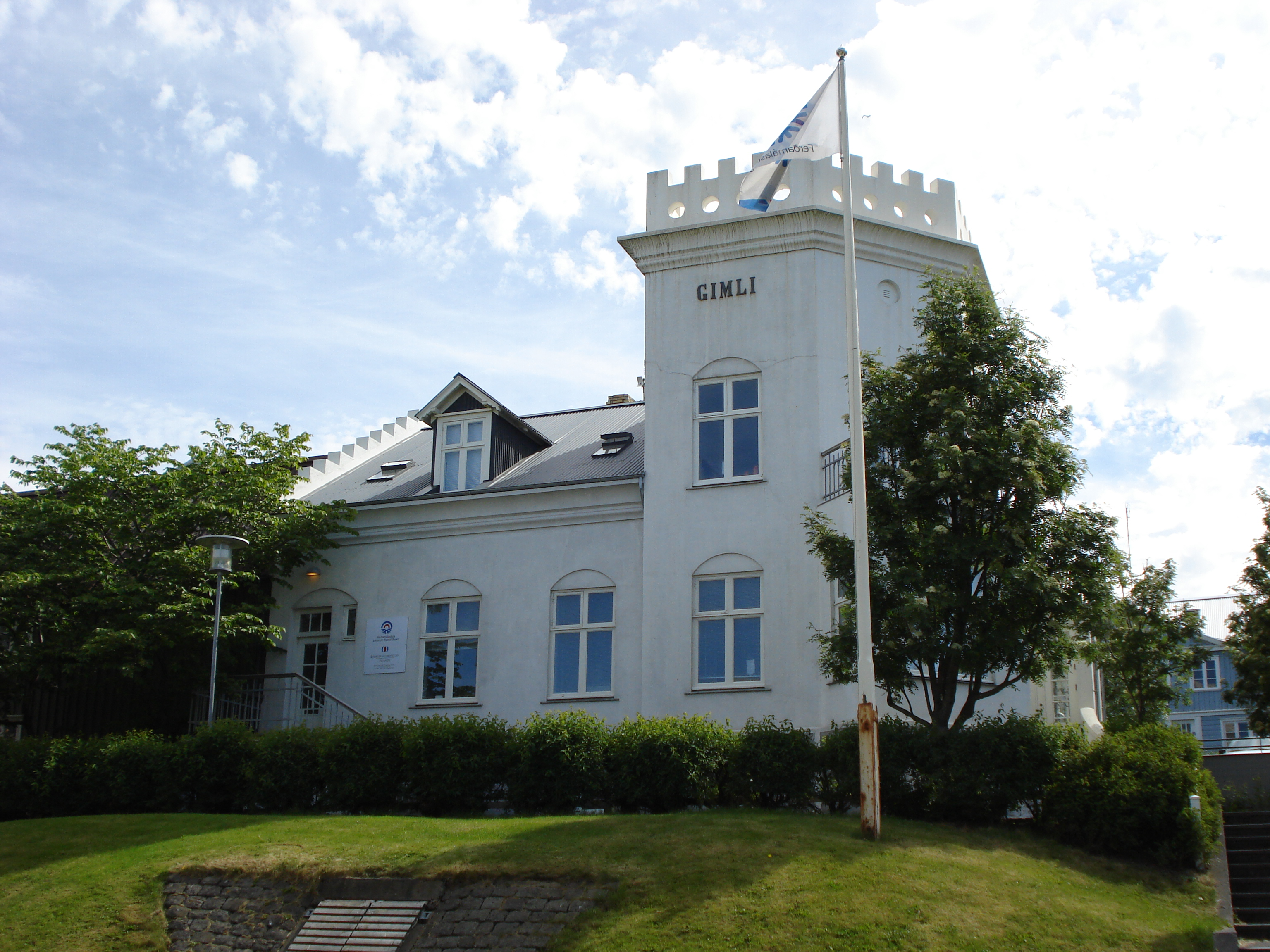 Gimli House, Reykjavík, Iceland